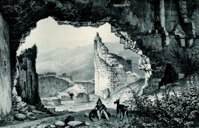 Titre: Château de Calmont d'olt dessin de Bichelois publié en 1833 Source: archive de Thierry Plume de Saint Côme d'Olt (avec son autorisation) Licences: CC